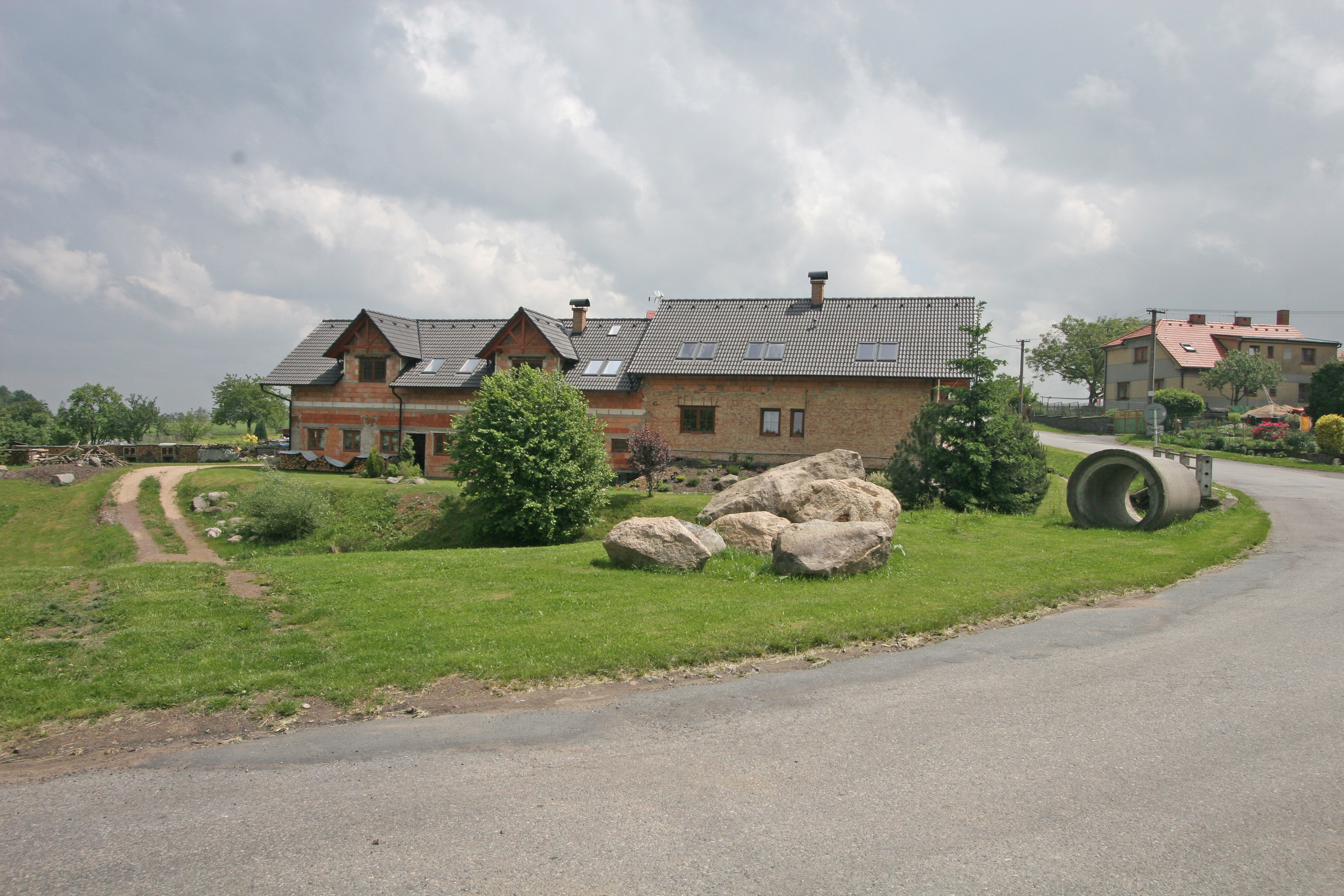 Zbyhněvice čp. 13